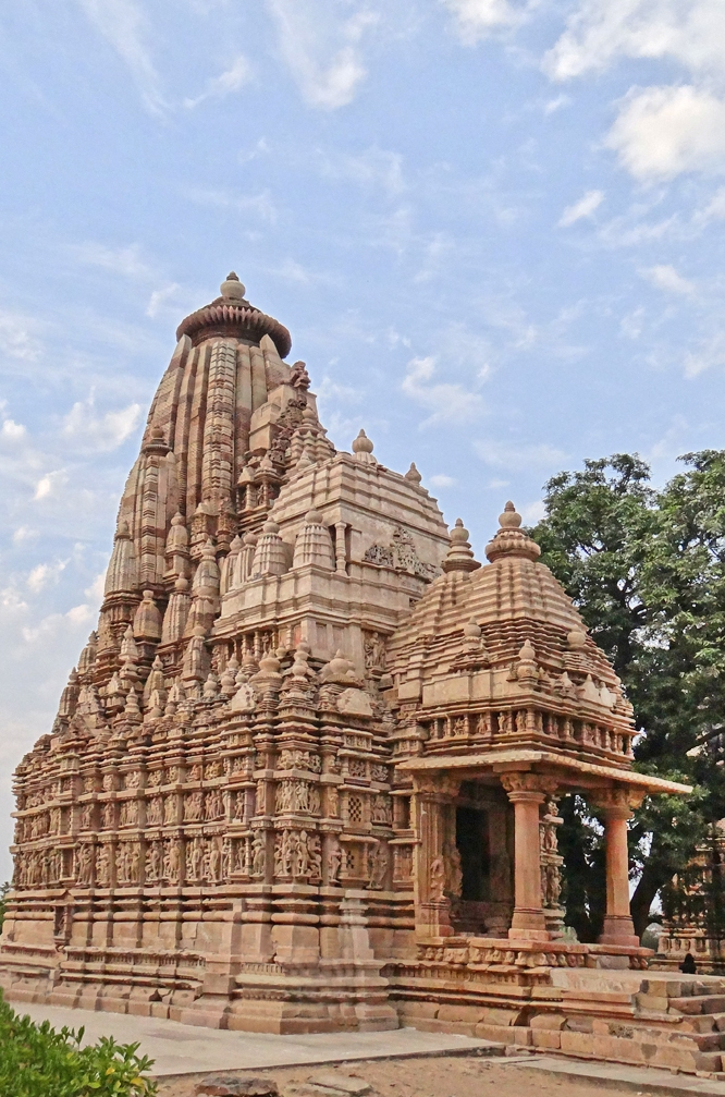 Vue d'ensemble du temple de Parshvanath à Khajuraho Ce temple est le plus imposant des temples jaïns du groupe est de Khajuraho. Il est renommé pour la qualité de ses sculptures extérieures. La religion jaïn n'étant pas touchée par le tantrisme, aucune scène érotique n'existe parmi les décors de ce temple qui date de la période 950-970. Le Jaïnisme a été fondé au VIème siècle avant J.-C. par Mahavira (599-527 av J-C), qui était un contemporain du Bouddha. Tous deux s'opposaient au système des castes, au pouvoir des brahmanes et aux rites hindouistes. La non-violence (Ahimsa) est l'un des fondements de la religion jaïne. Selon Wikipedia, Parshvanâtha (Parshvanath) - au VIIIe ou VIIe siècle av. J.-C. - est un ascète membre du clan des Licchavi, qui aurait fondé un ordre comprenant 8 communautés. Ce temple lui a été dédié au XIXème siècle, cet ascète a été l'inspirateur de la religion jaïne. Les maîtres sont représentés nus sur les panneaux sculptés. Articles de Wikipedia sur le Jaïnisme et les Tîrthankara (maîtres jaïns)